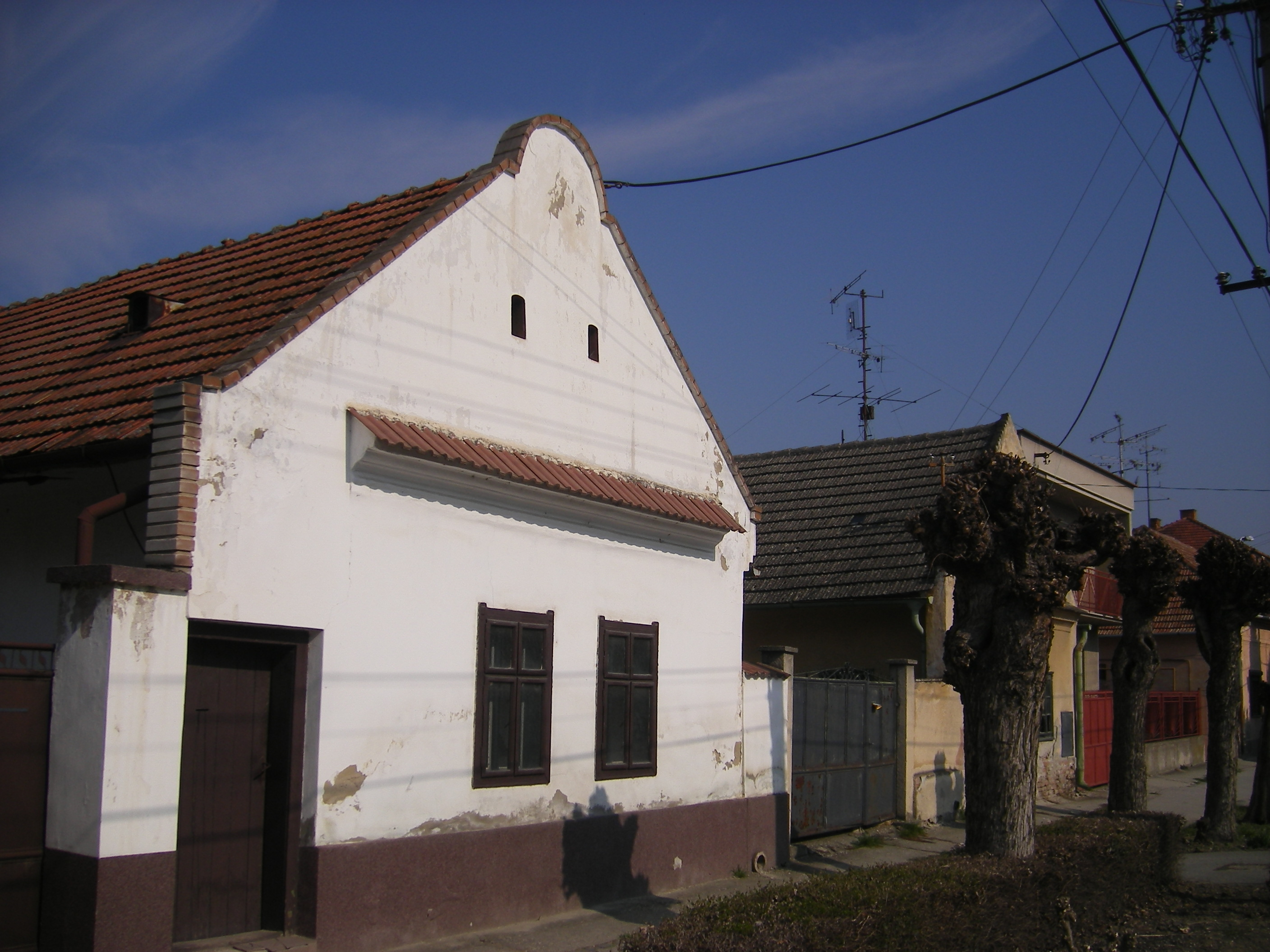 Gúta, régi parasztház